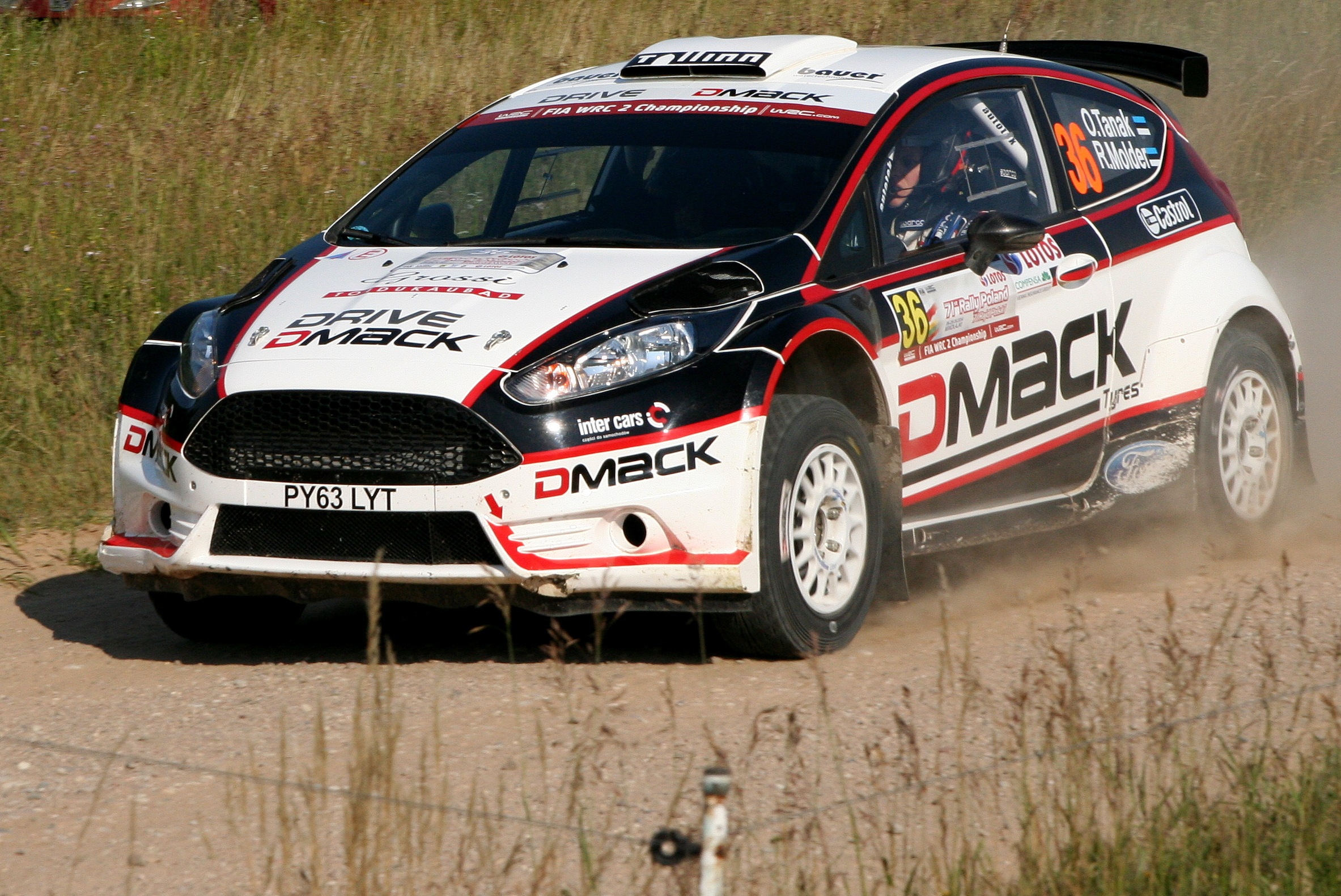 Ott Tänak podczas Rajdu Polski 2014, 11 OS Chmielówka 1